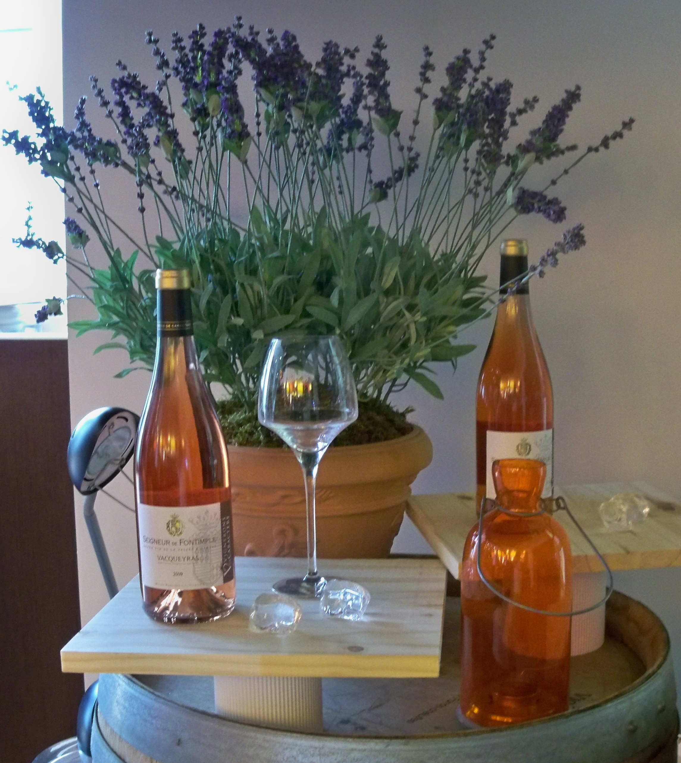 Bouteille de rosé d'AOC Vacqueyras